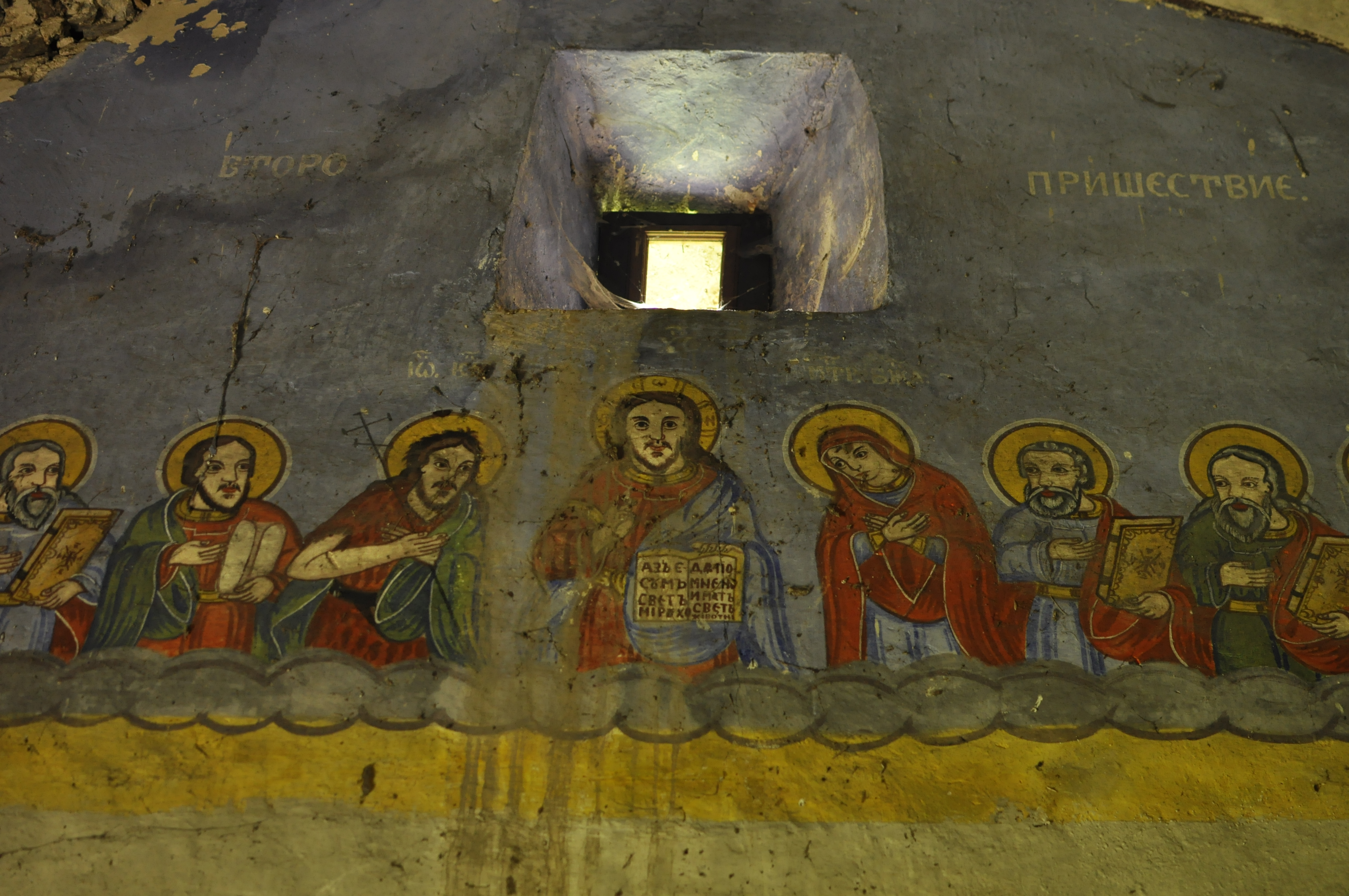 Унутрашњост цркве Светог Ђорђа у селу Славиња код Пирота